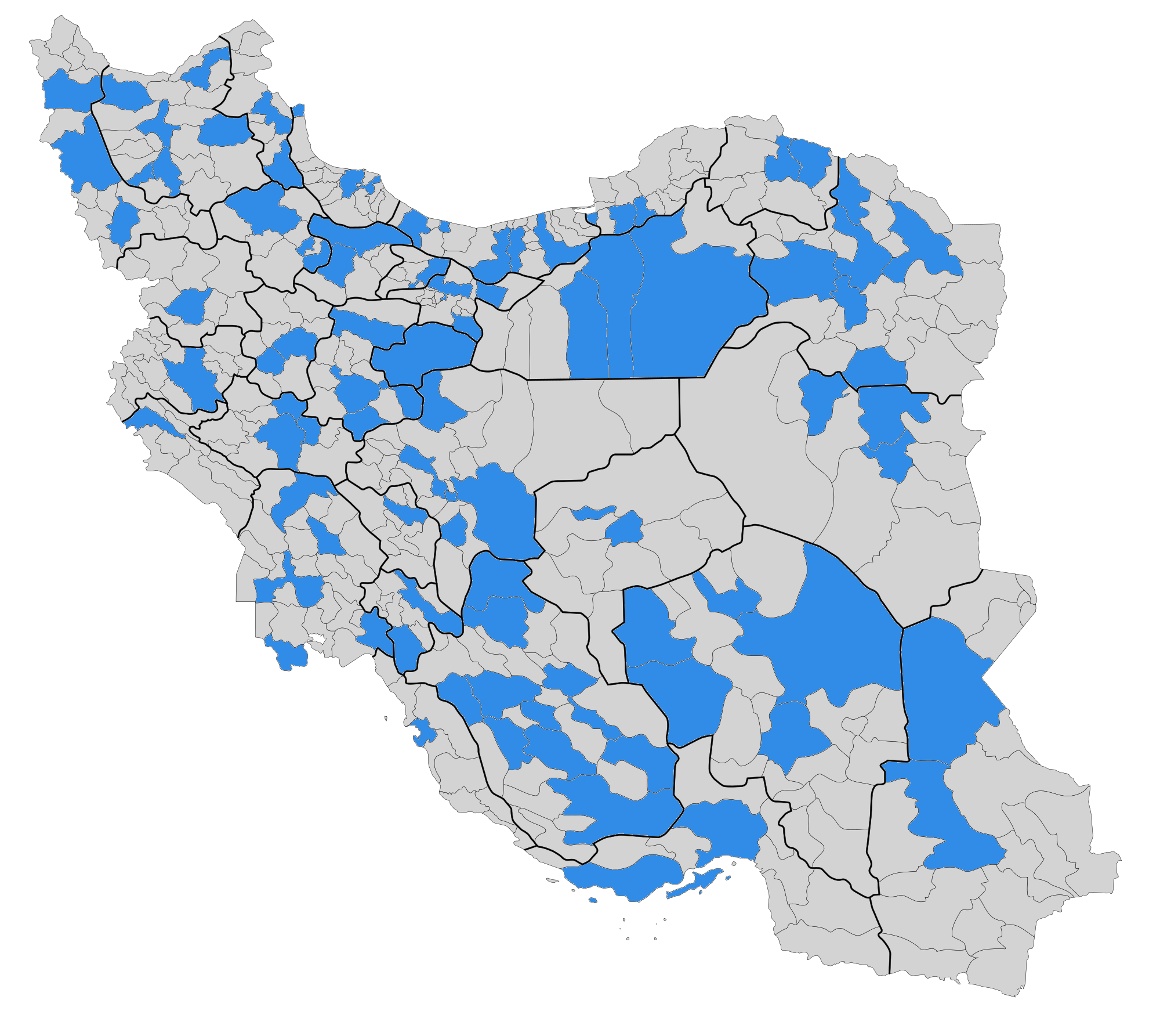 نقشه شهرستان‌هایی که دارای واحد مجری علوم پزشکی دانشگاه آزاد هستند. پرونده اصلی:File:Iran_Counties.svg منبع:[1]